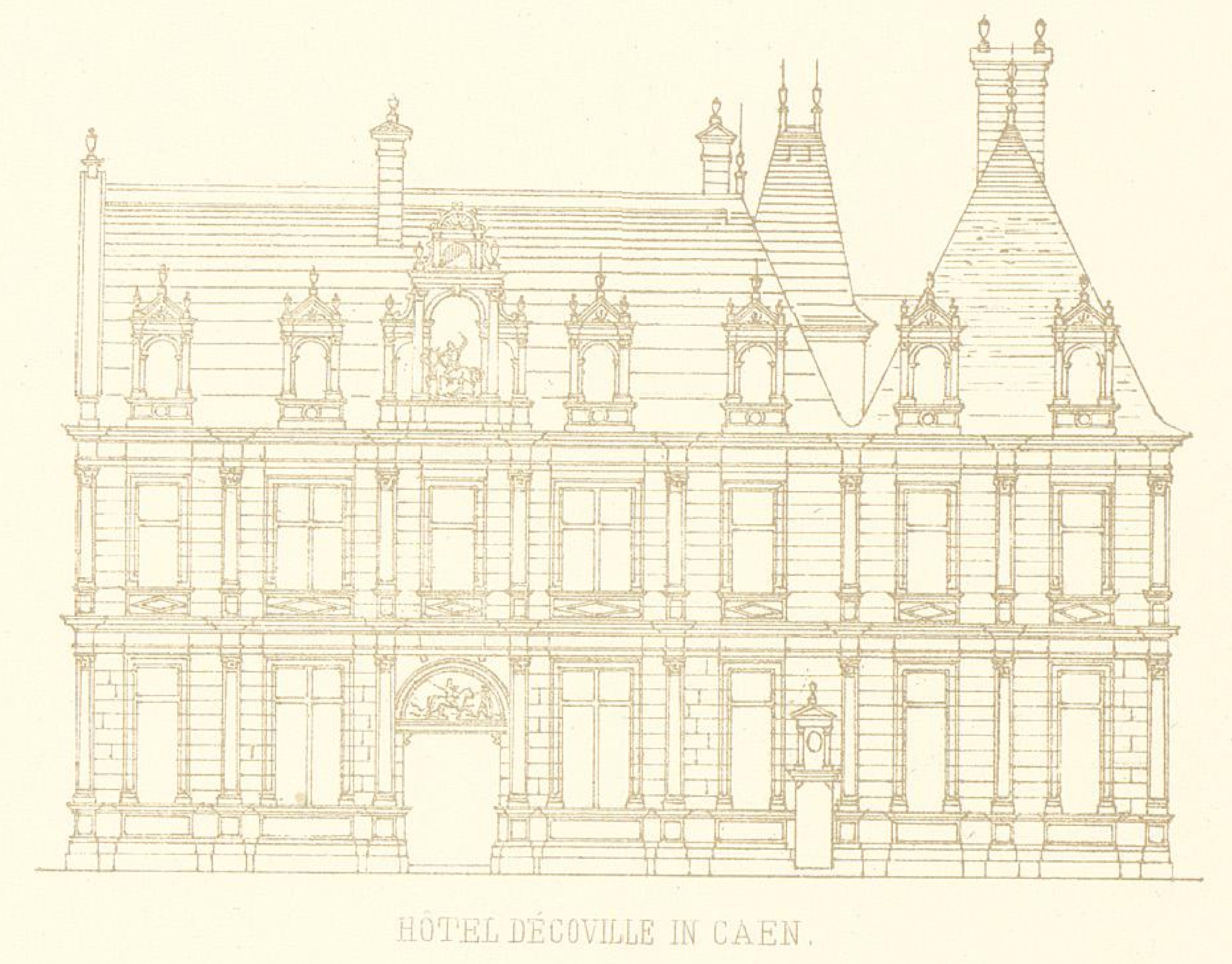 reconstitution de la façade de l'hôtel d'Escoville à Caen, extrait de Baukunst d. Renaissance in Frankreich, hrsg. v. Zeichenaussch. d. Stud. d. TH Berlin, 1875